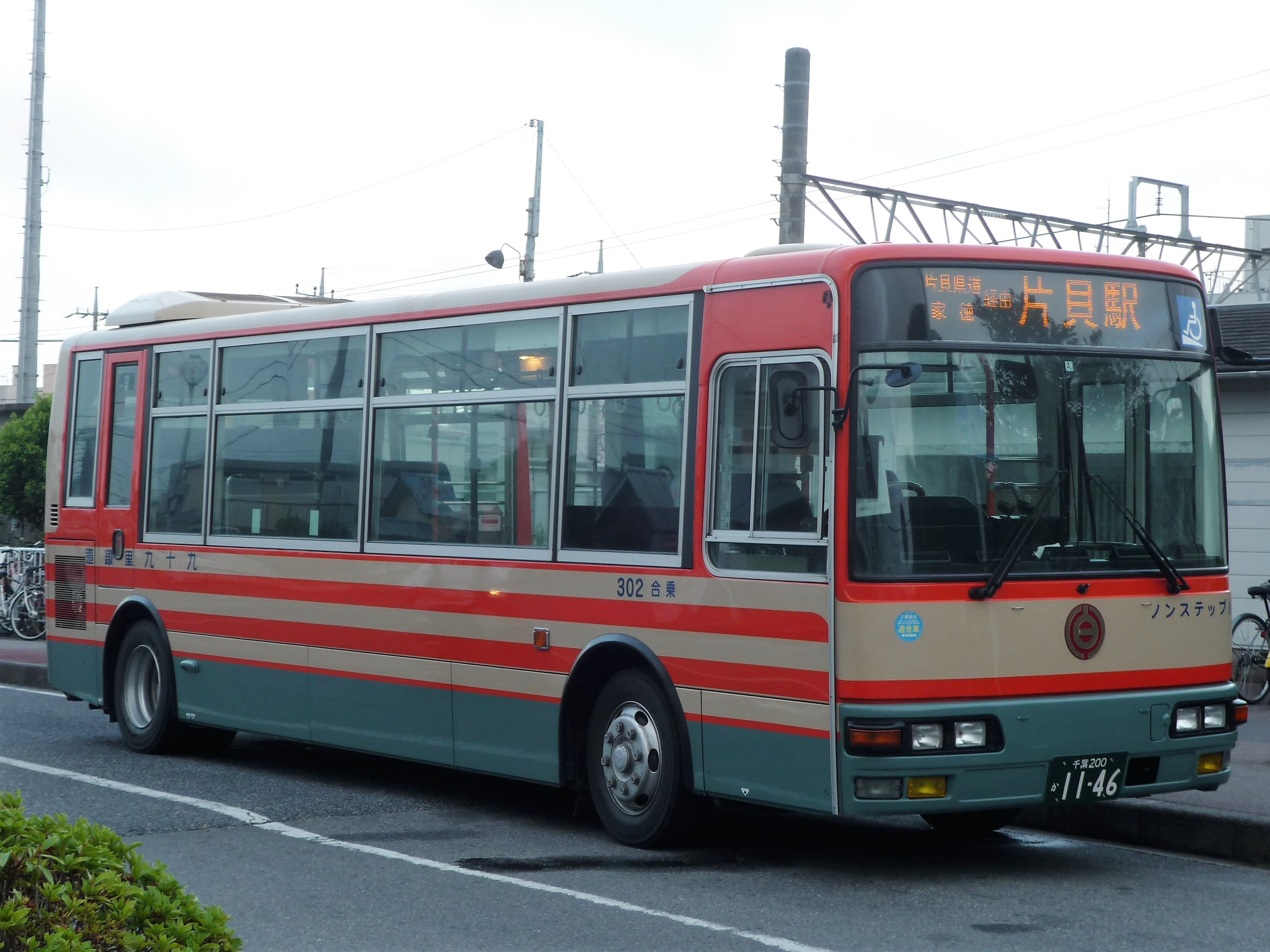 東金駅前に停車中の九十九里鉄道バス Panasonic Lumix DMC-FS3